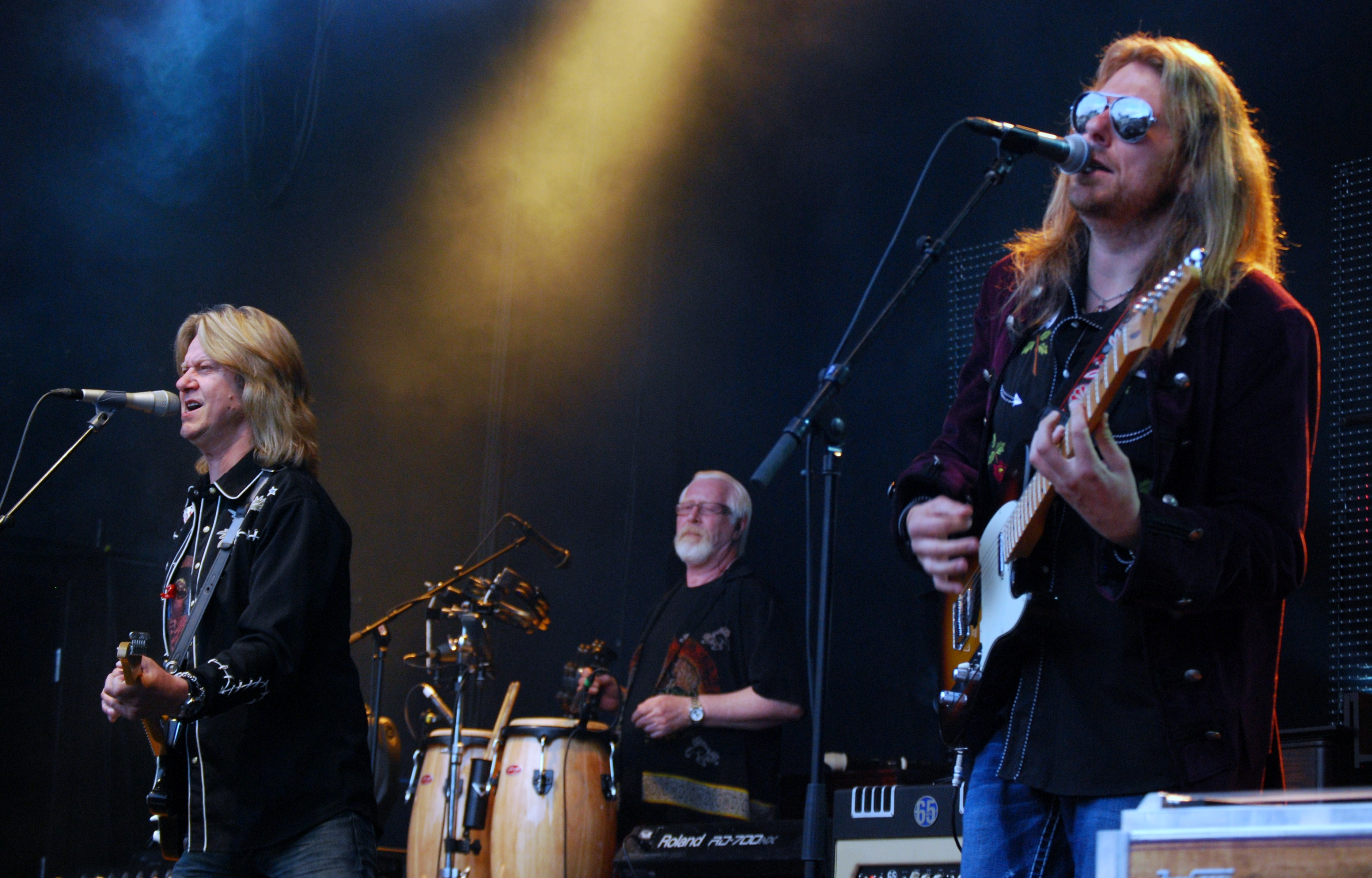 Hellbillies under en konsert i Langesund juli 2011.